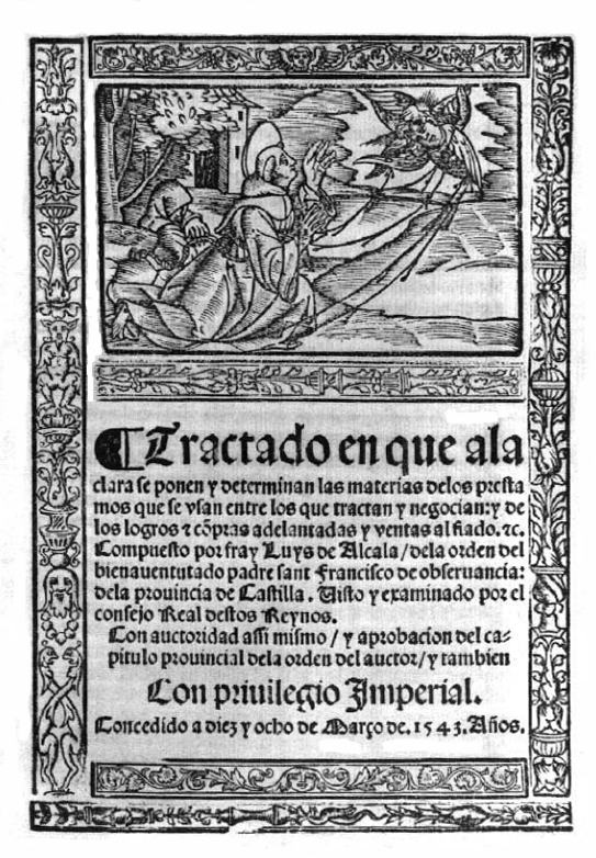 Portada del libro titulado Tratado en que a la clara se ponen y determinan las materias de los prestamos que se usan entre los que tractan y negocian, publicado por Luis de Alcalá en Toledo en 1543.